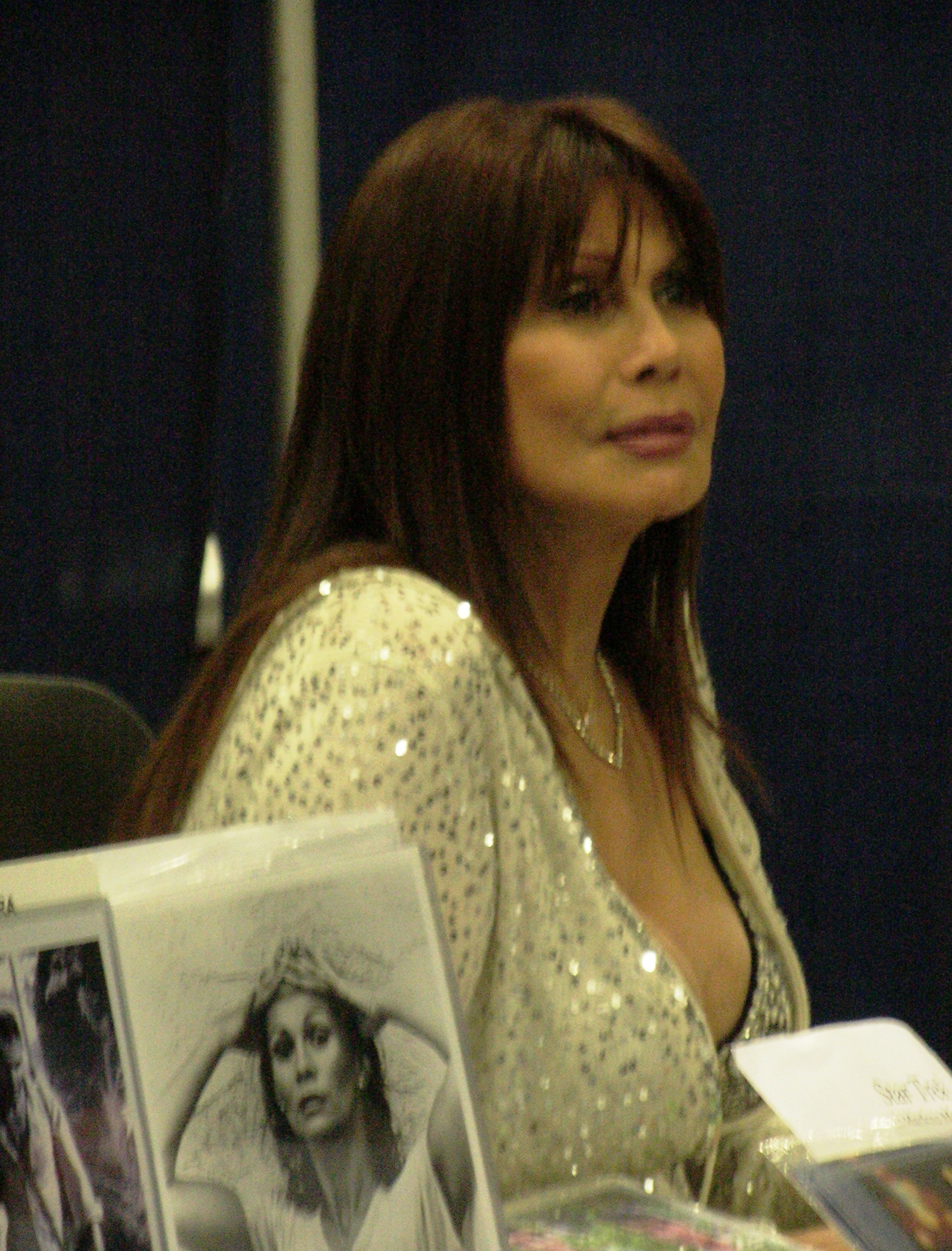 BarBara Luna at WonderCon 2009.